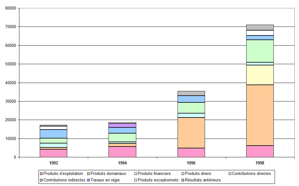 Budgets prévisionnels de la municipalité de Tougan (Burkina Faso), entre 1992 et 1998.